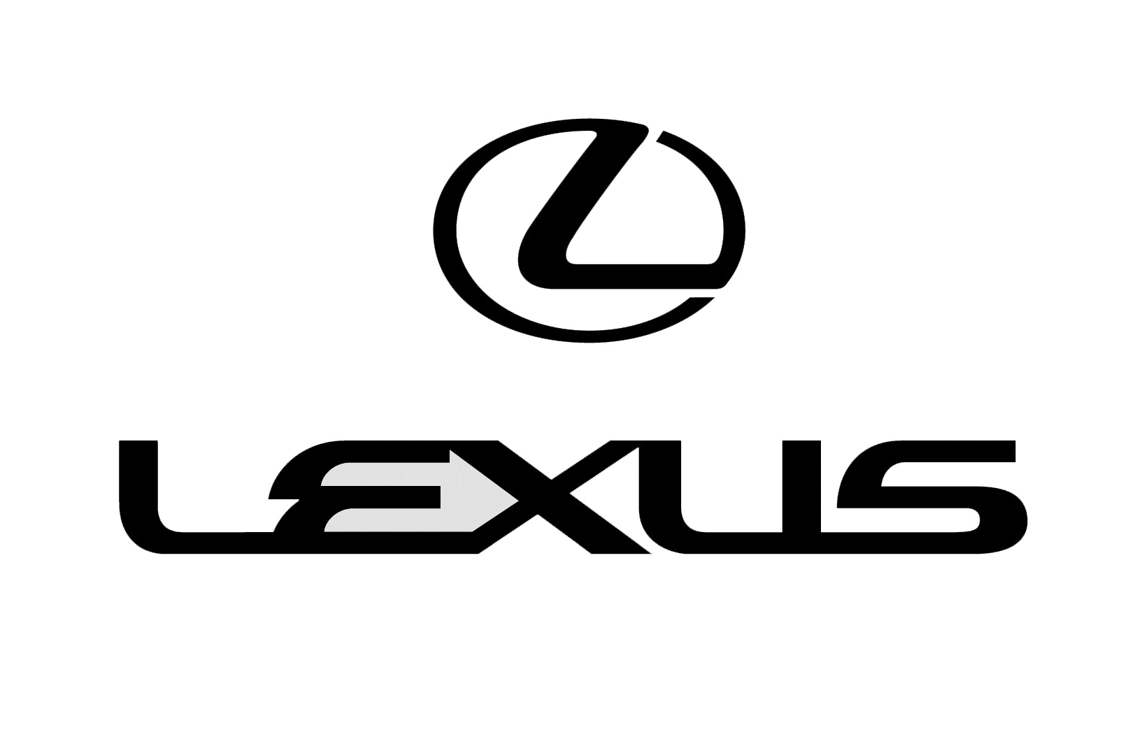 Logo